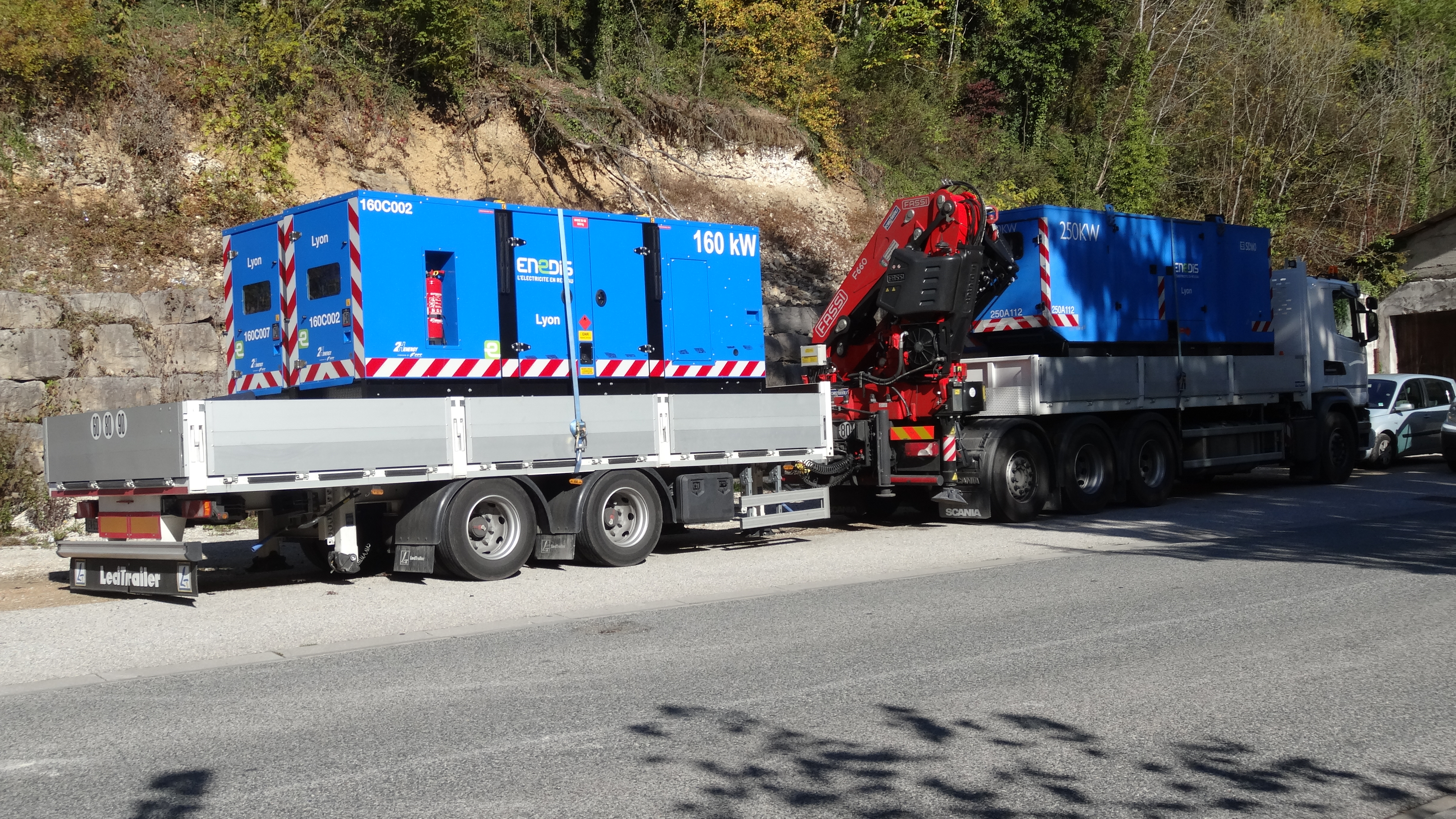 Groupes électrogènes mobiles ERDF de 160 et 250 kW chargés sur un camion